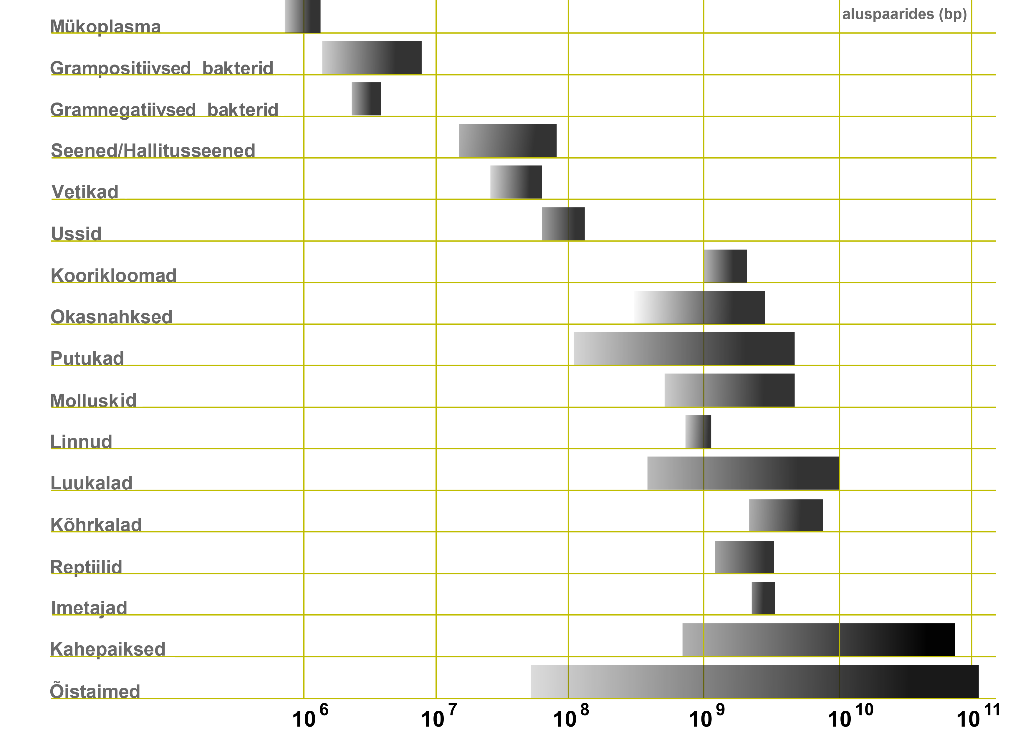 Genoomi suuruste vahemik erinevatel eluvormidel